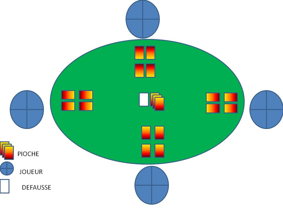 Disposition des cartes pour une partie de Tamalou